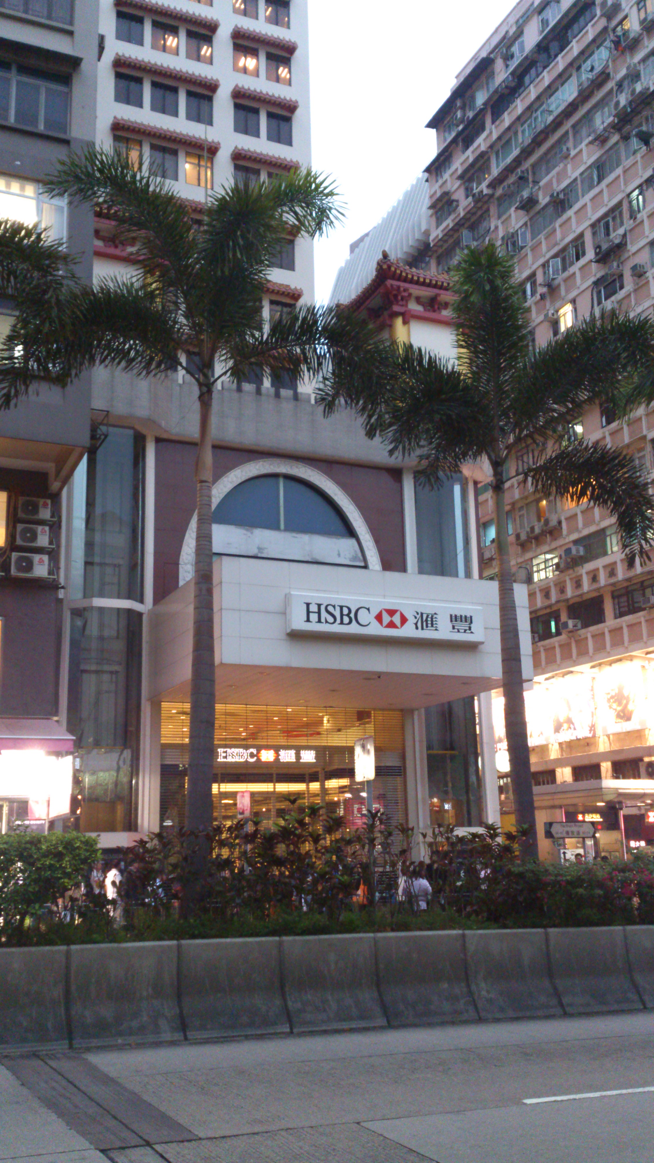 海防逍道hsbc